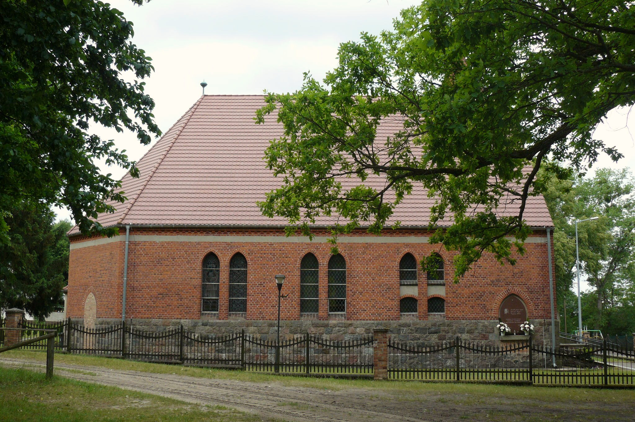 Kościół Wniebowzięcia NMP w Rąpinie.